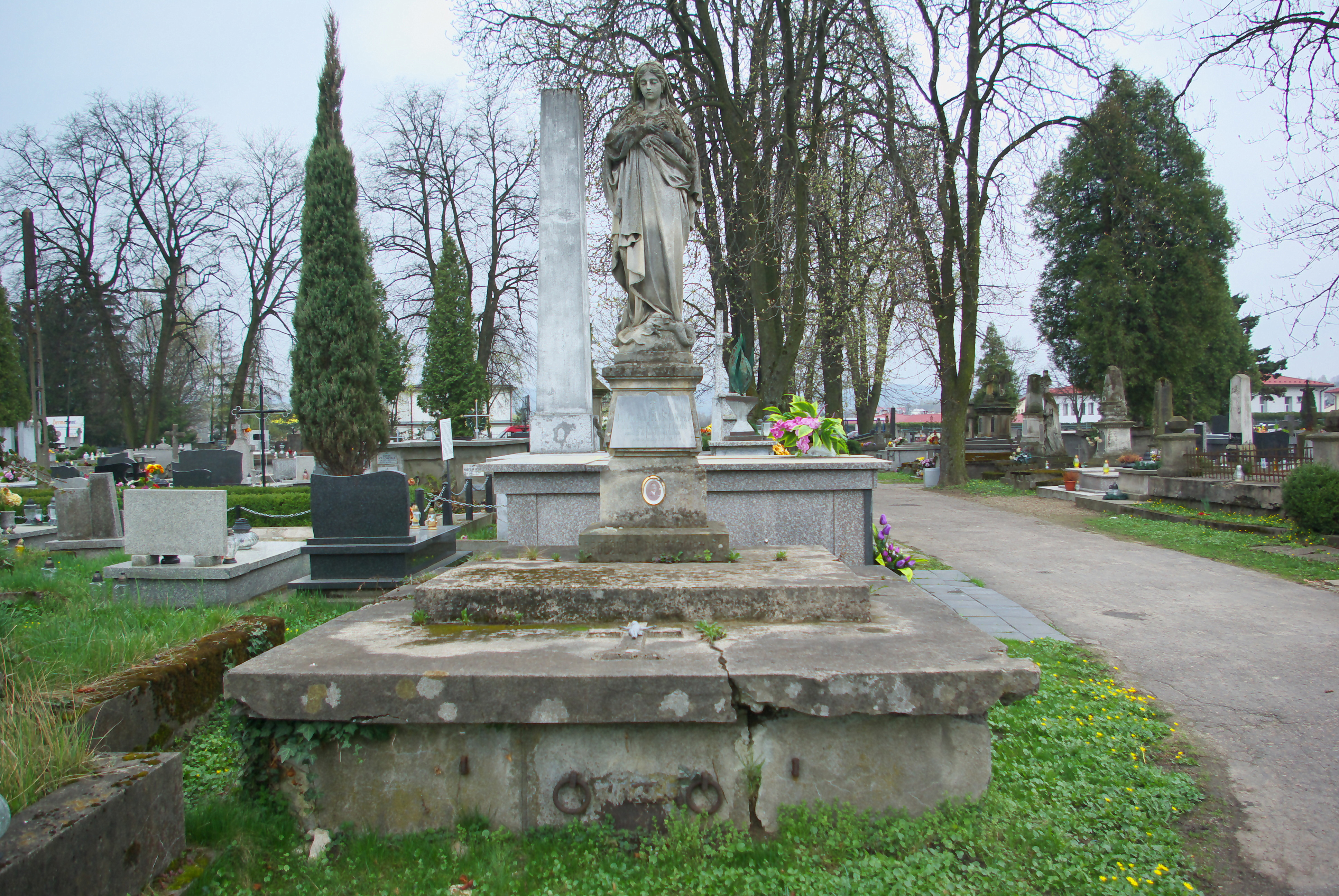 Grobowiec rodziny Pleszowskich na Cmentarzu Centralnym w Sanoku.